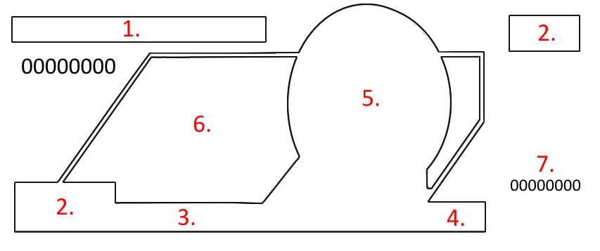 Partes de los billetes D1.